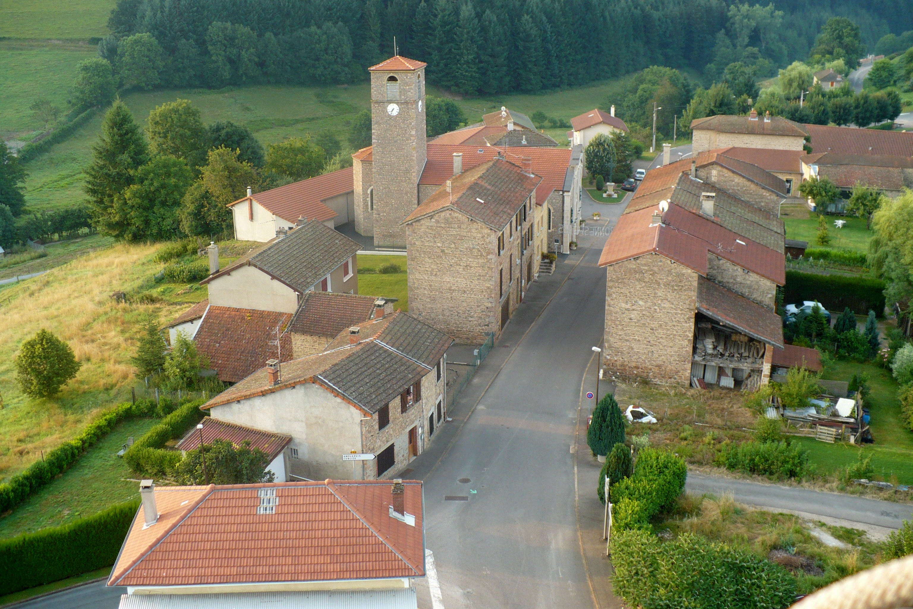 photo de La Chapelle-de-Mardore prise des airs en 2008